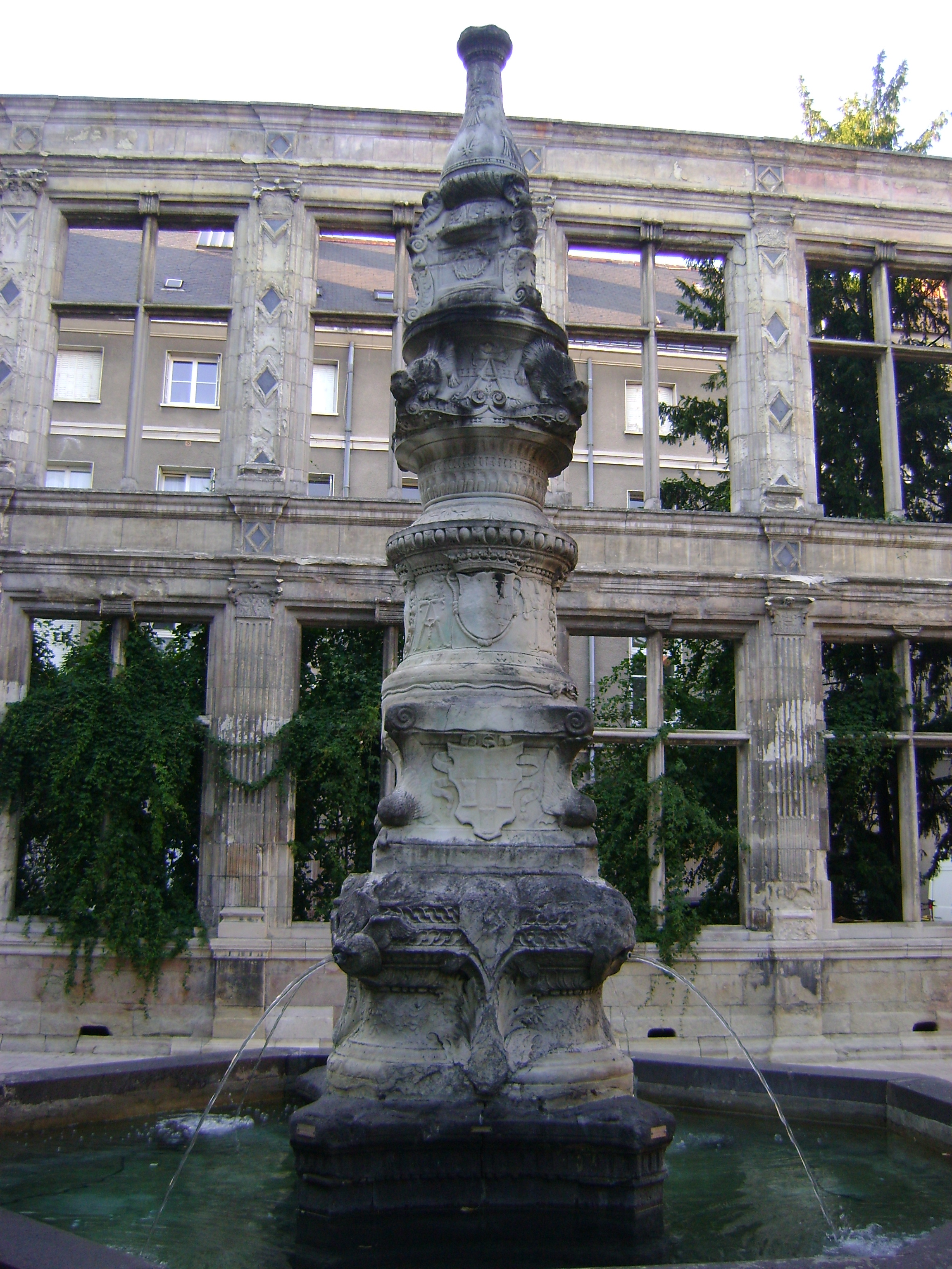 Fontaine de Beaune-Semblançay, tours, Indre-et-Loire.